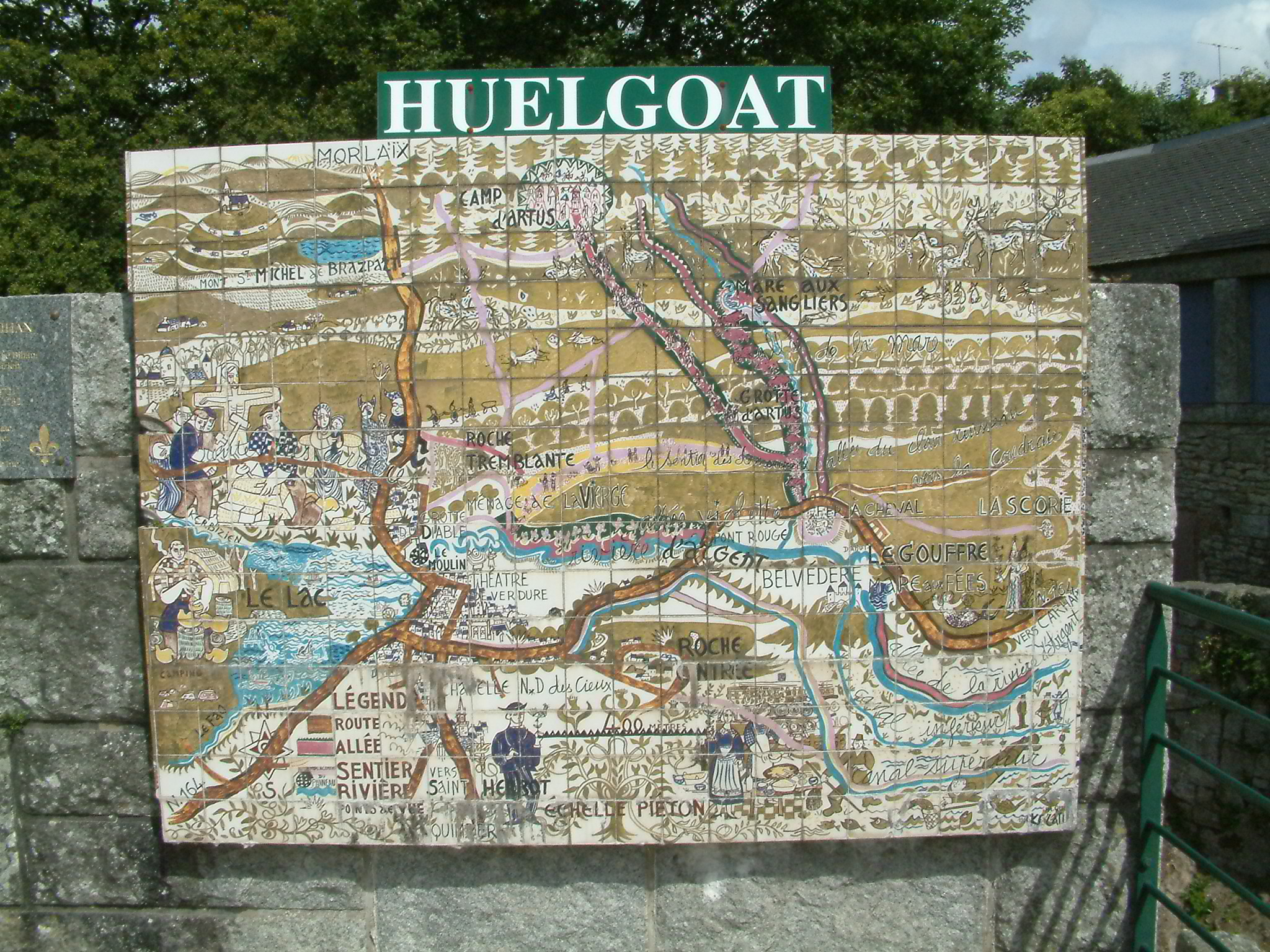 Der Eingang in Huelgoat